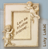 CD "Len sa kľudne priznaj...", titulní strana